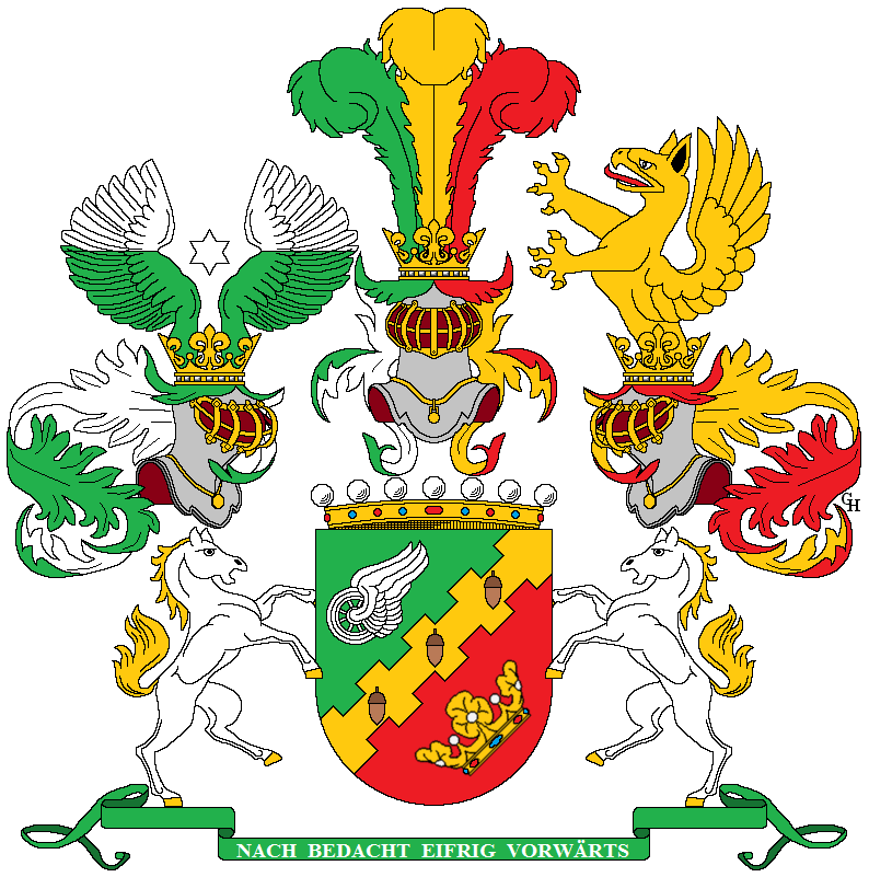 Wappen des deutsch-österreichischen Eisenbahningenieurs und -unternehmers Wilhelm Ritter Eichler von Eichkron (1818–1892), verliehen anlässlich seiner Erhebung in den österreichischen Freiherrenstand 1878. Zeichnung von Gerd Hruška ( Für weitere Informationen zu dieser Standeserhebung siehe (